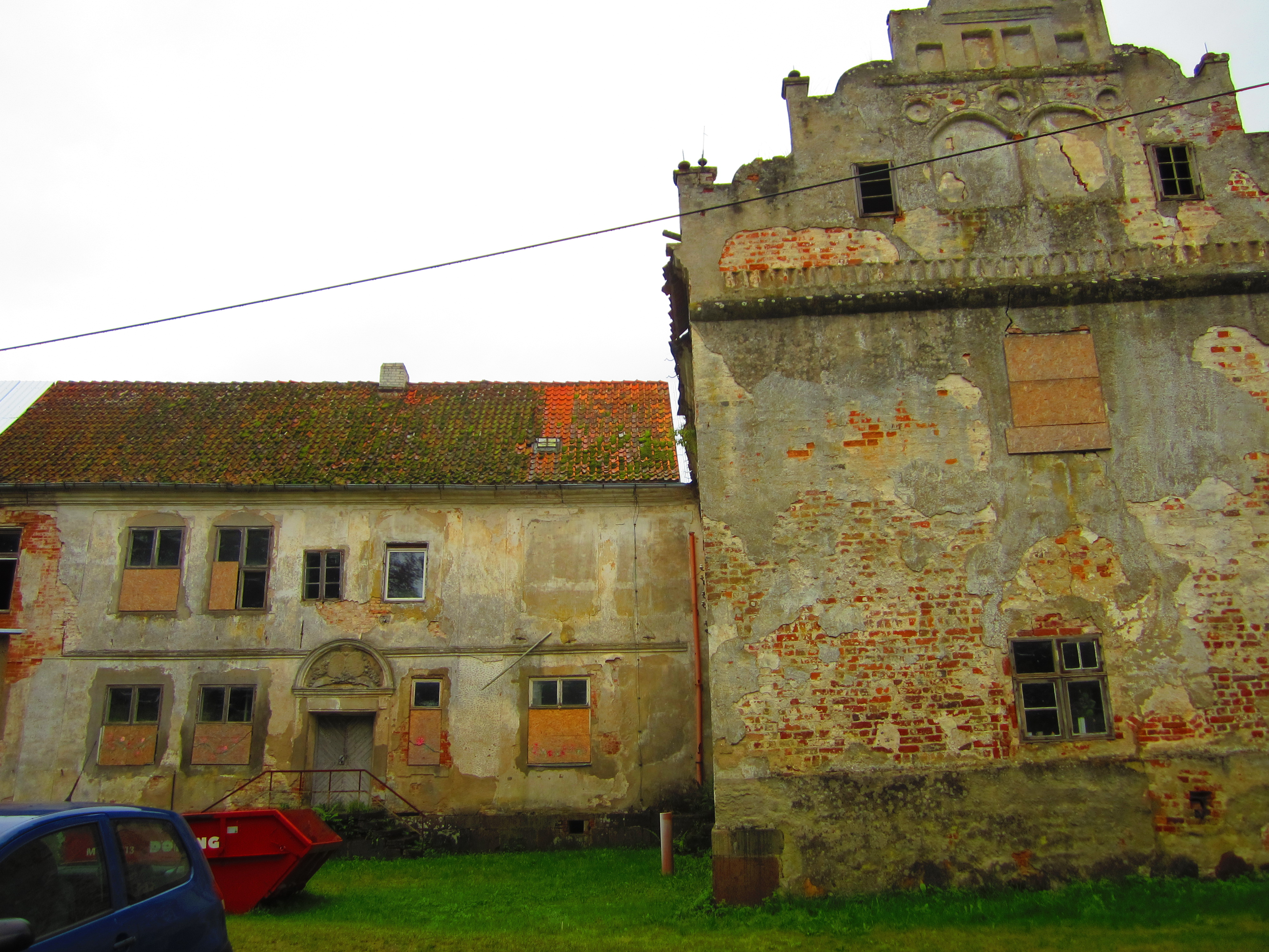 Wasserschloss Divitz